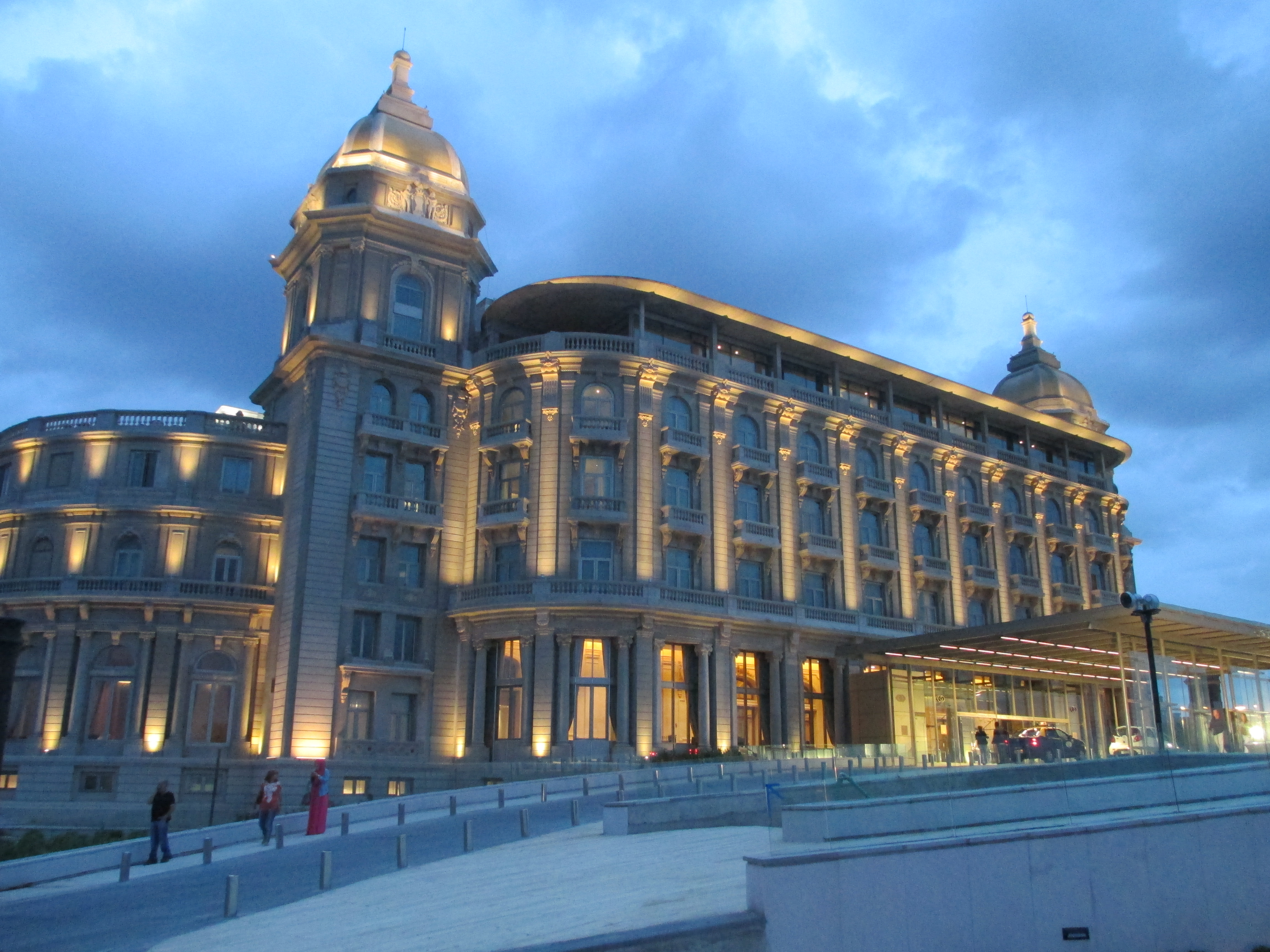 Hotel Casino Carrasco en Montevideo, Uruguay.